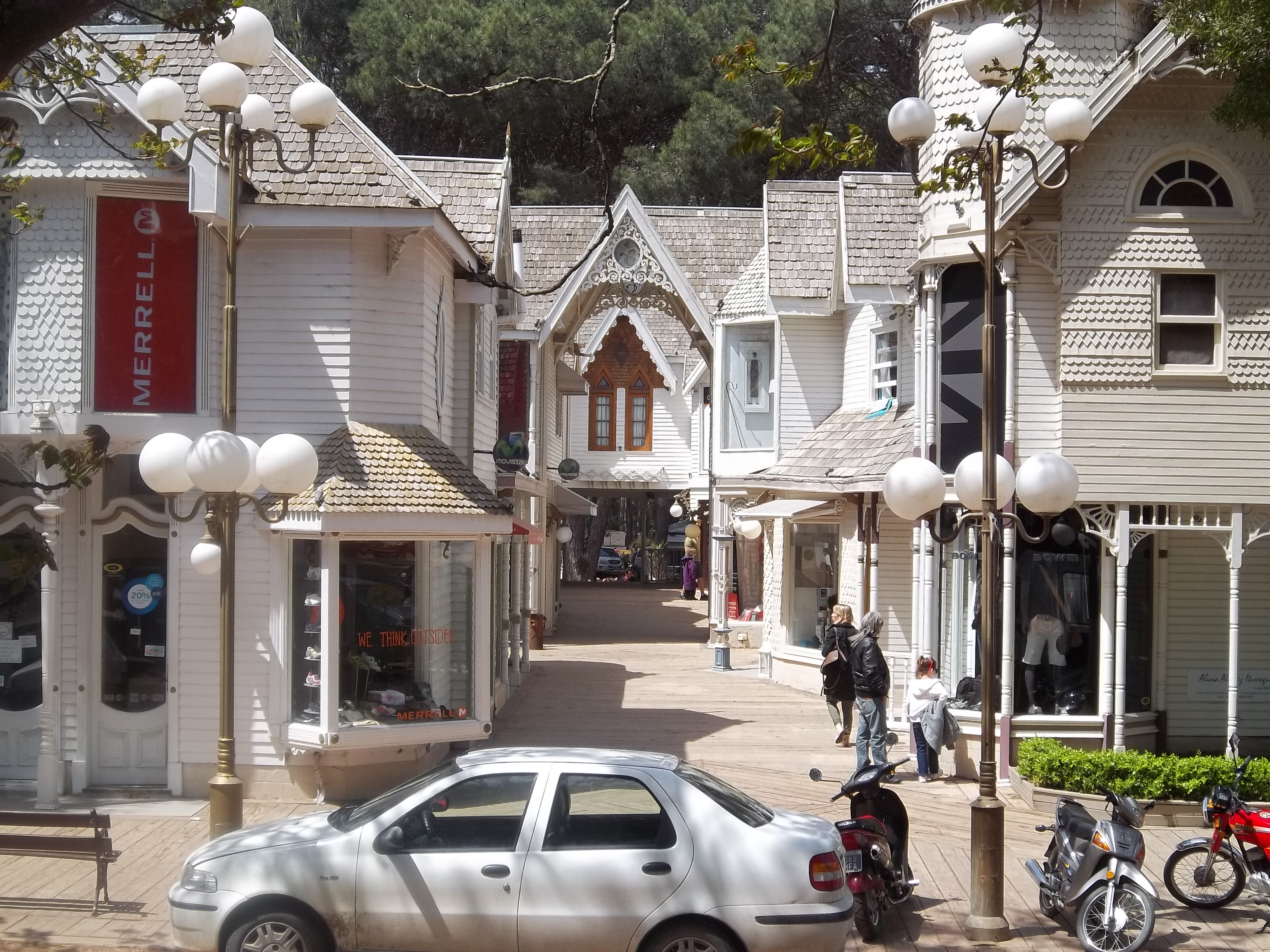 Paseo de las Victorias en el centro comercial de Cariló, partido de Pinamar, provincia de Buenos Aires, Argentina.